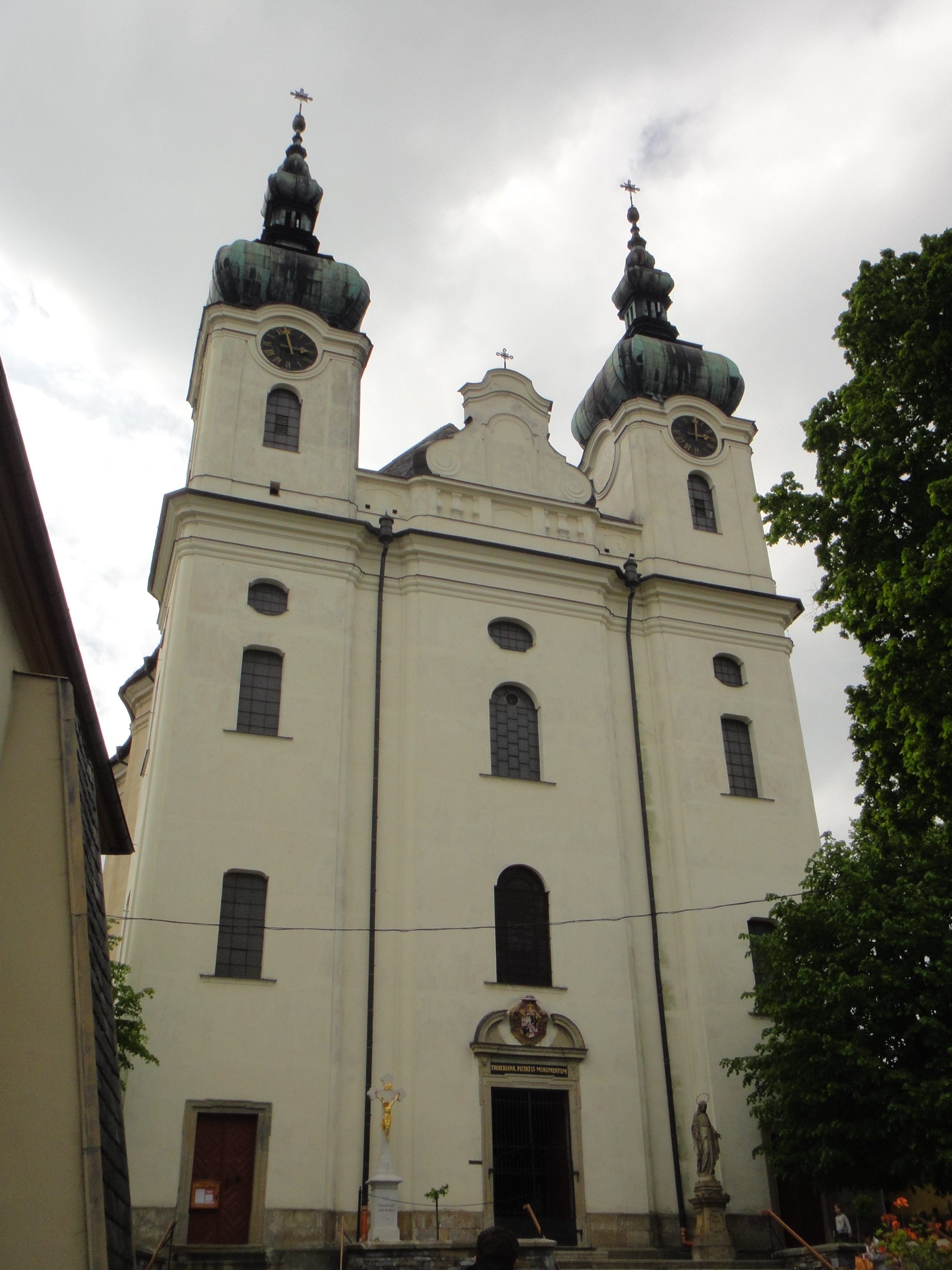 Kostel Nanebevzetí Panny Marie s farou, Halaškovo náměstí 1, Budišov nad Budišovkou.